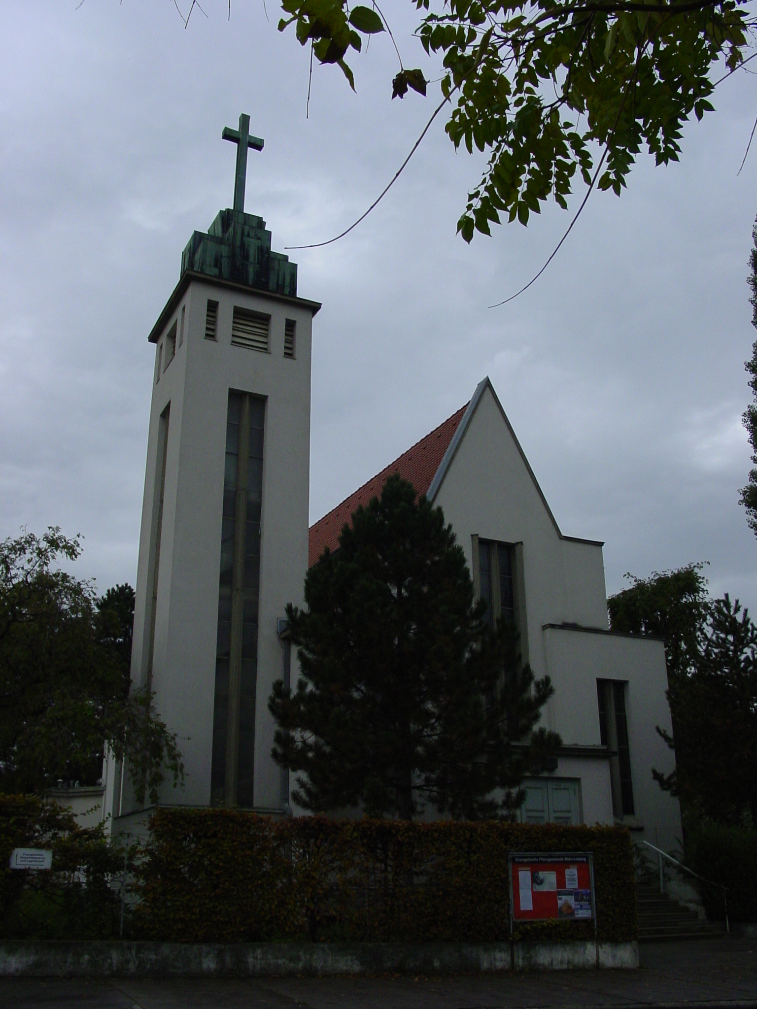 evangelische Johanneskirche in Wien-Liesing